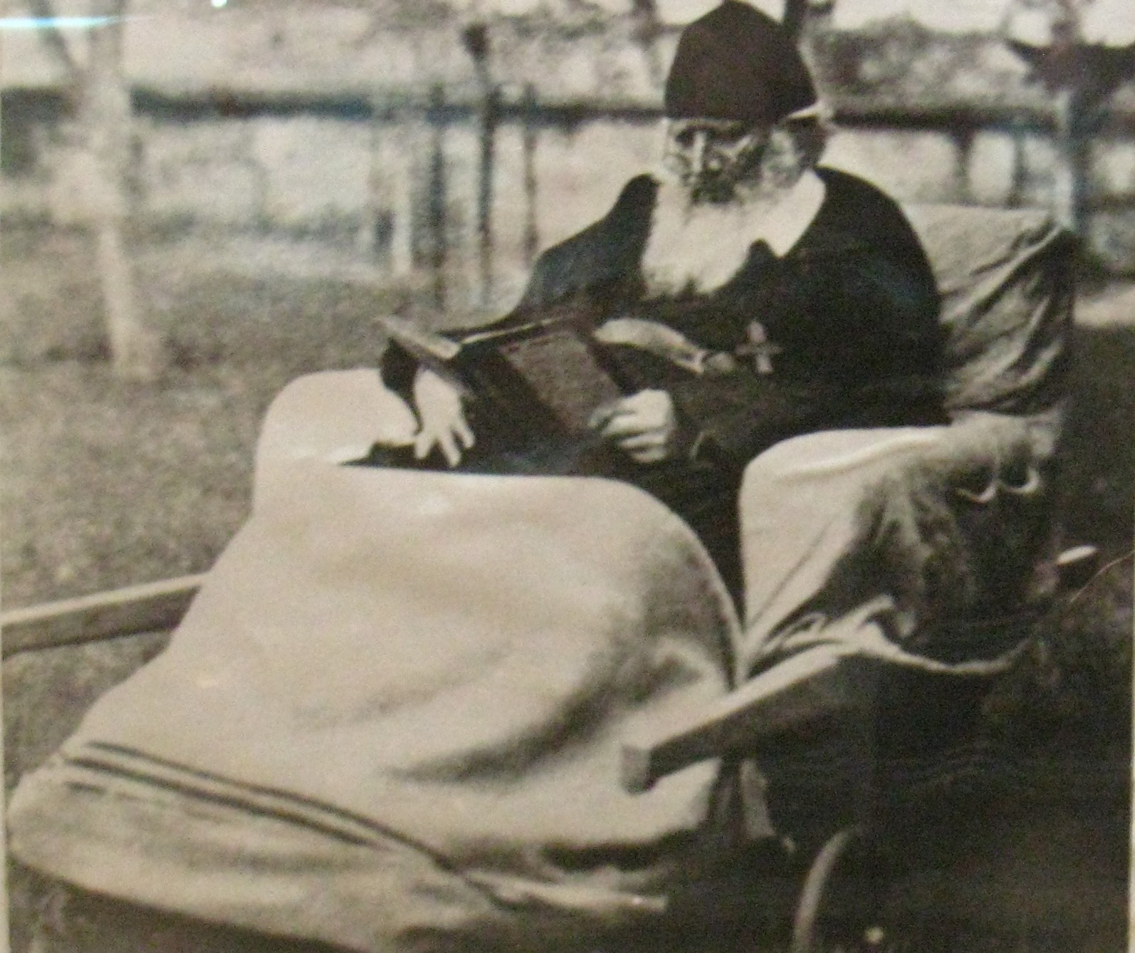 Fotografia che ritrae l'arcivescovo di Leopoli Andrej Szeptycki il 30 dicembre 1941 esposta al Museo della Storia della Religione di Leopoli